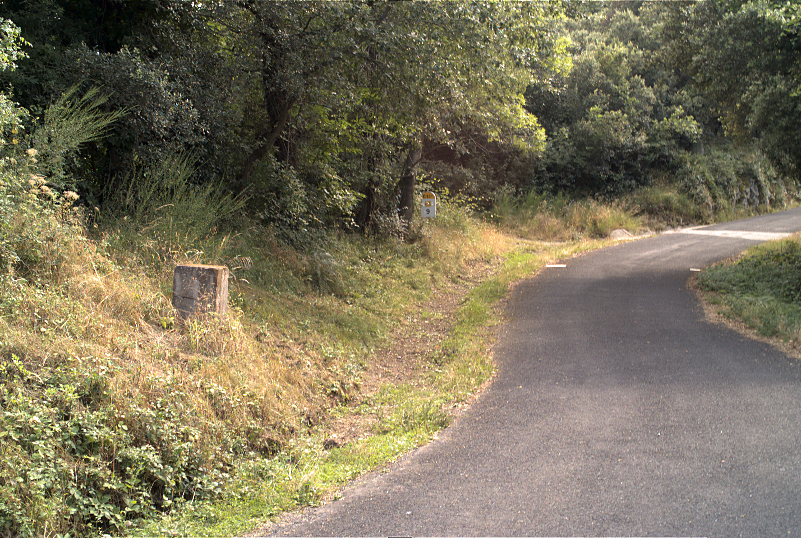 Col de Mirailles, Céret (Pyrénées-Orientales, Languedoc-Roussillon, France)